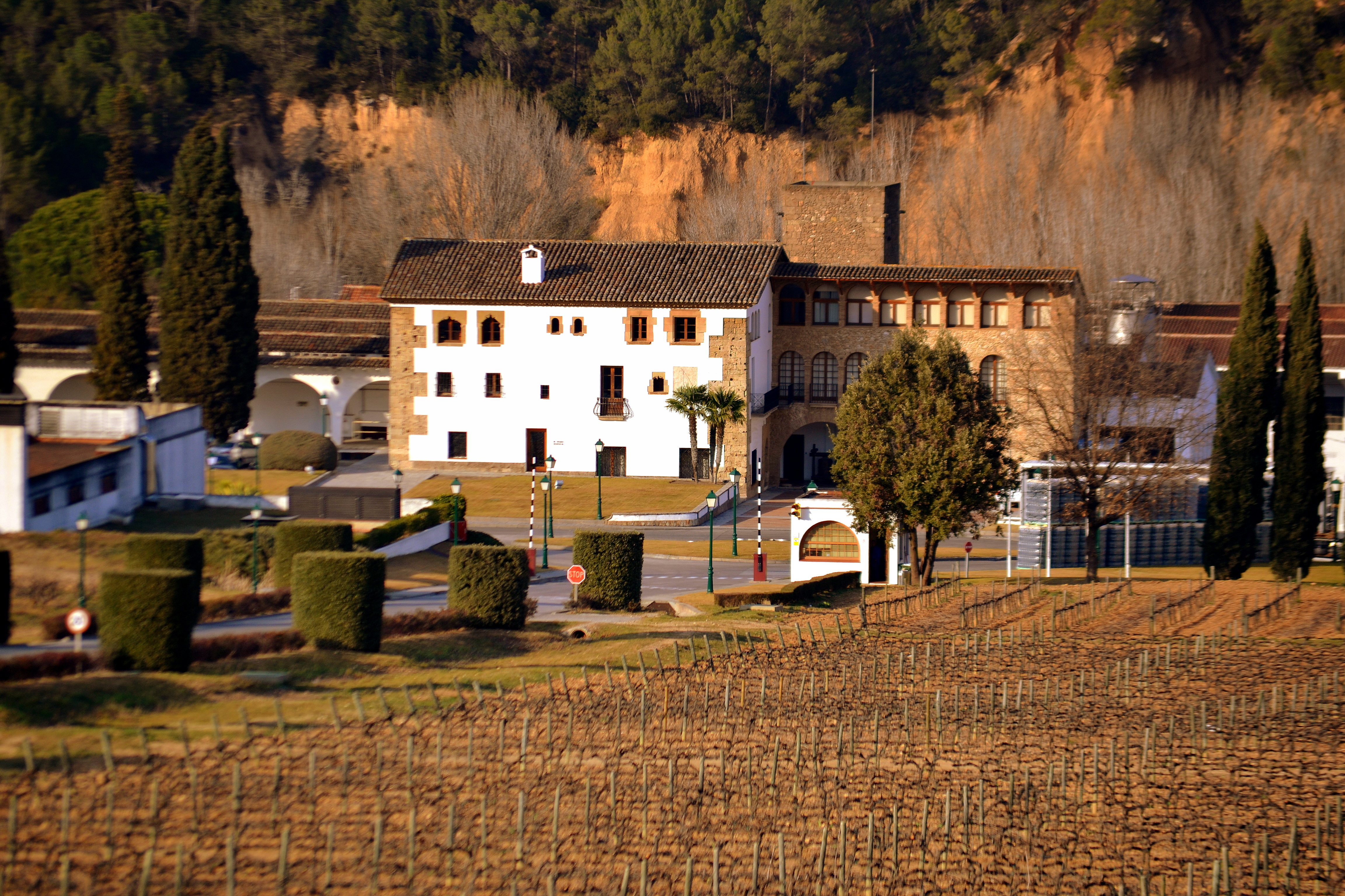 De l'autor "La finca Segura Viudas va néixer el segle XI amb la medieval torre Galimany, una torre de vigilància habitada que pertanyia al bisbat de Sant Cugat del Vallès. La construcció encara és visible avui dia, per bé que, cap al segle XIII, la torre va perdre la seva importància defensiva i es va transformar en una masia senyorial, el mas d’Aranyó. A la dècada del 1950, la família Segura Viudas va adquirir la finca. Hi va fer una aposta per la innovació que va aixecar l’admiració al Penedès de l’època pel seu abast. Del 1957 ençà, van començar a elaborar cava i vi embotellat. El 1969 van decidir crear una marca amb els seus propis cognoms i, una mica després, a partir de la dècada del 1970, esdevingué una marca de referència a escala espanyola."